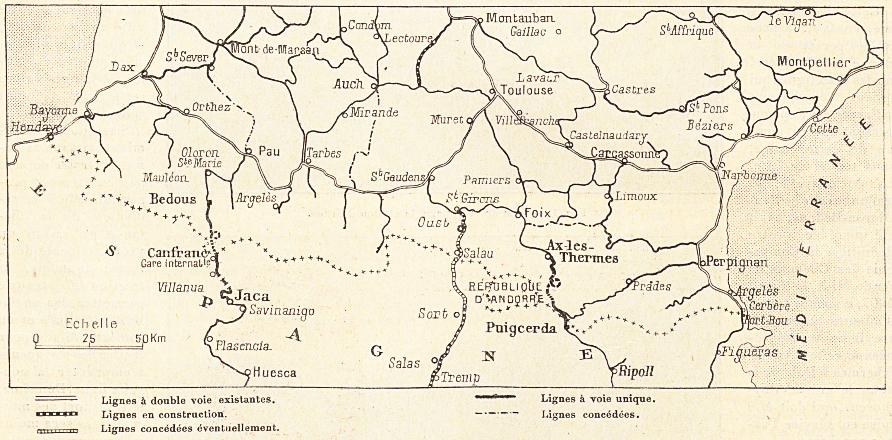 Carte de la région pyrénéenne, montrant le tracé des trois chemins de fer transpyrénéens.